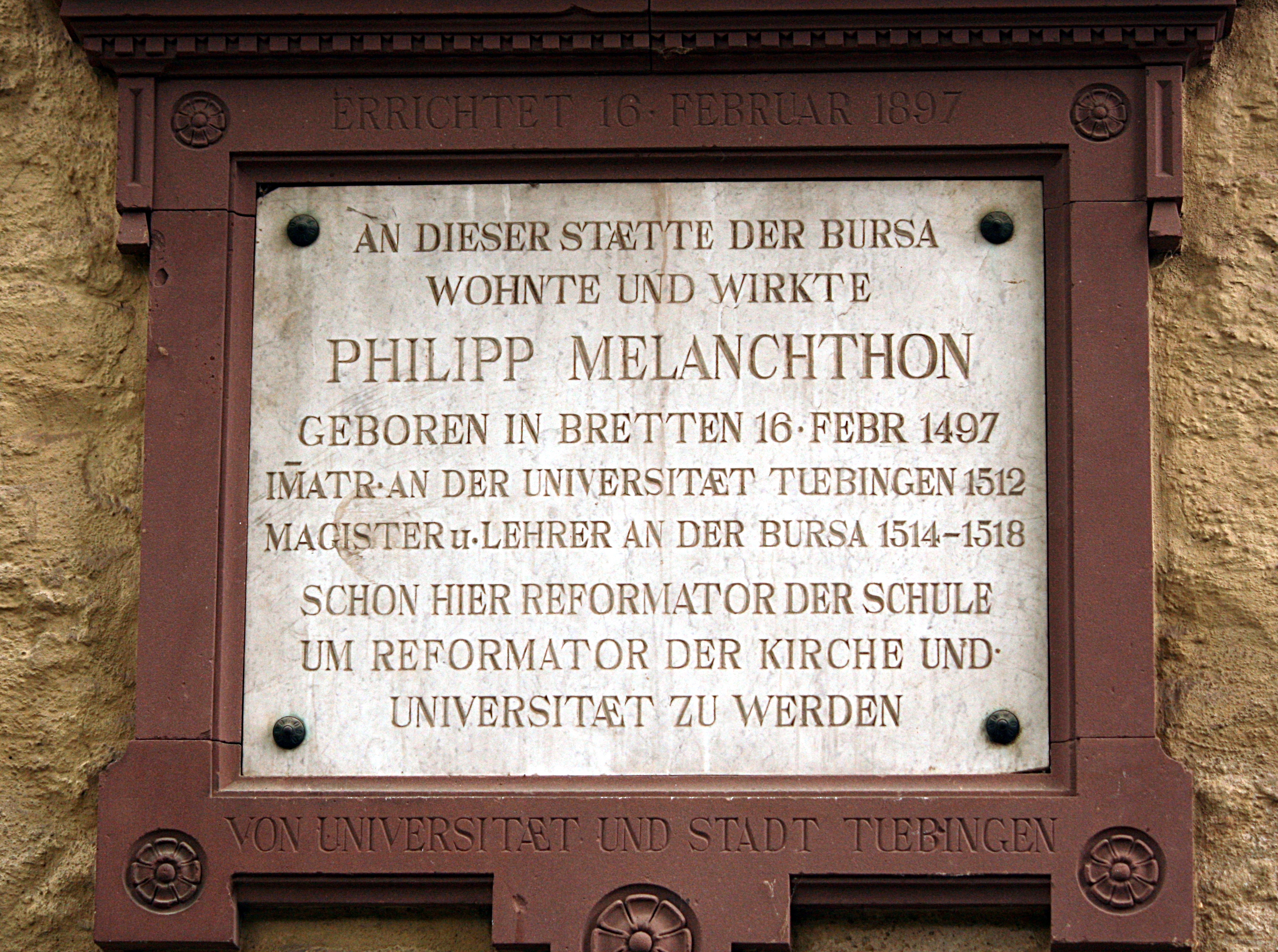 Tübingen, Burse, Tafel Melanchthon